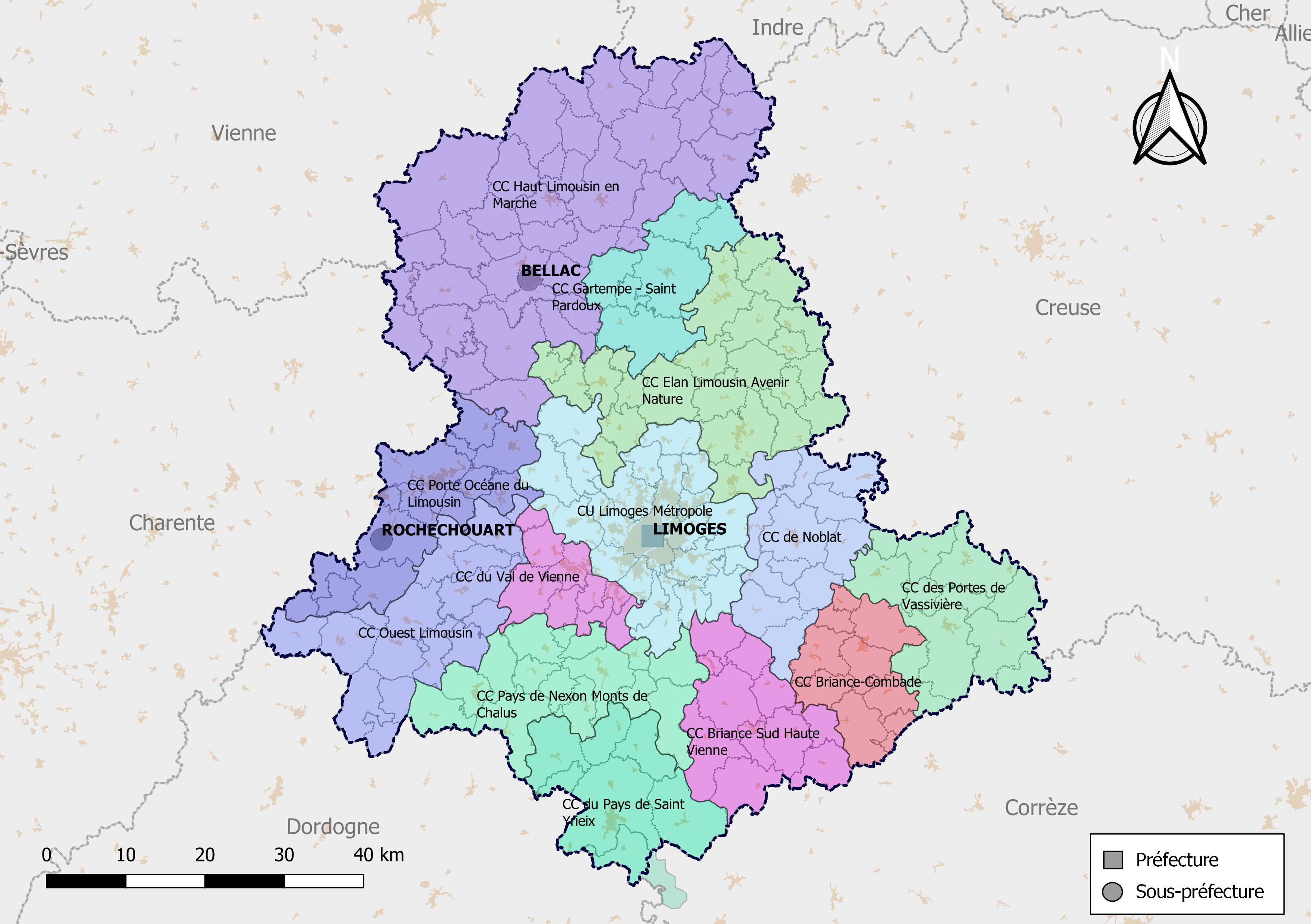 Carte des intercommunalités du département de la Haute-Vienne, France. Composition au 1er janvier 2019.